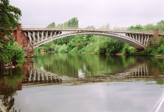 Holt Fleet bridge